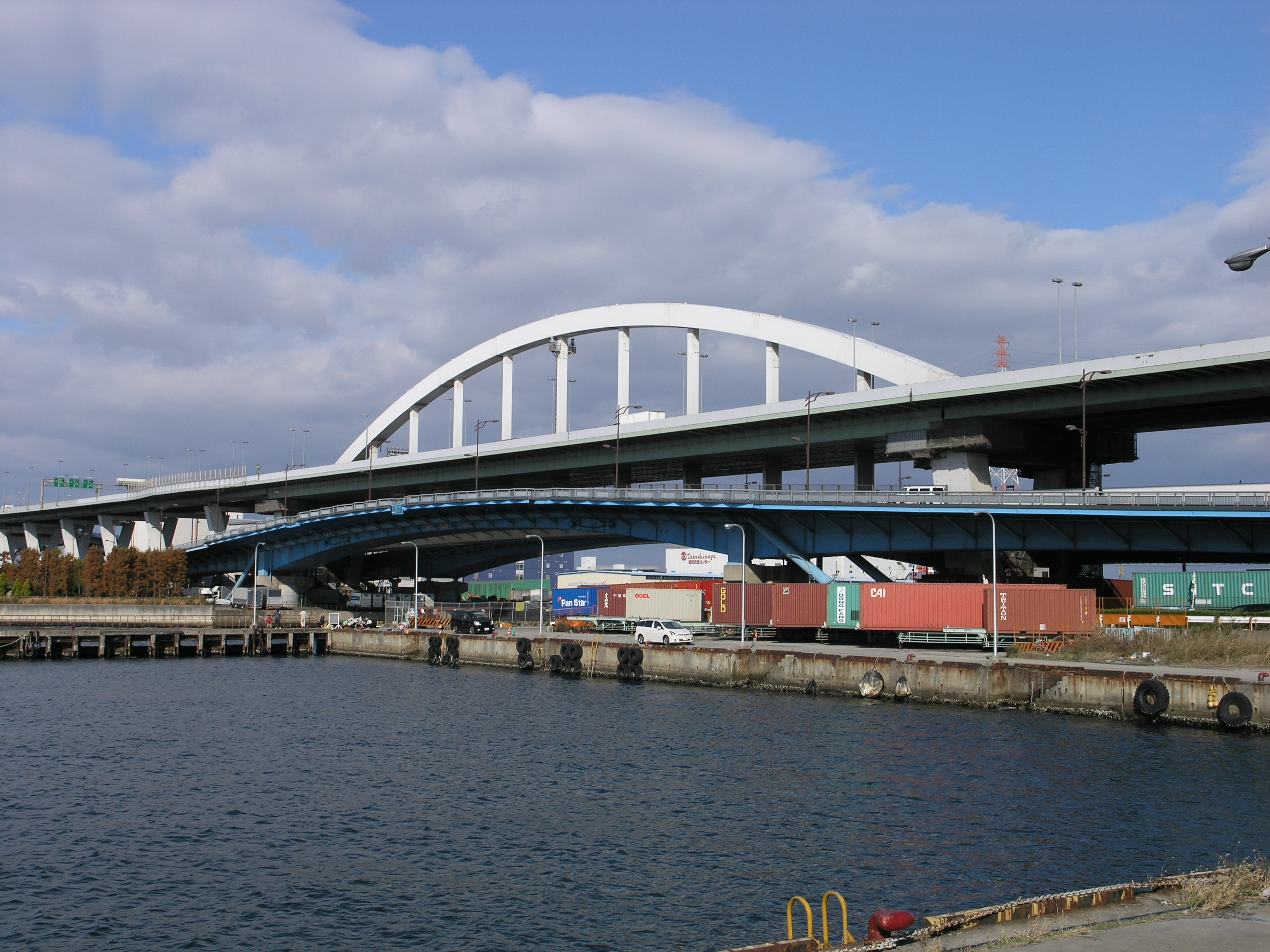 南港大橋（大阪市住之江区） 2008年11月撮影。 機材：C8080WZ 撮影者：Kansai explorer